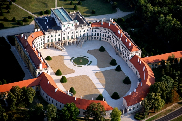 A fertődi kastély légi fotója